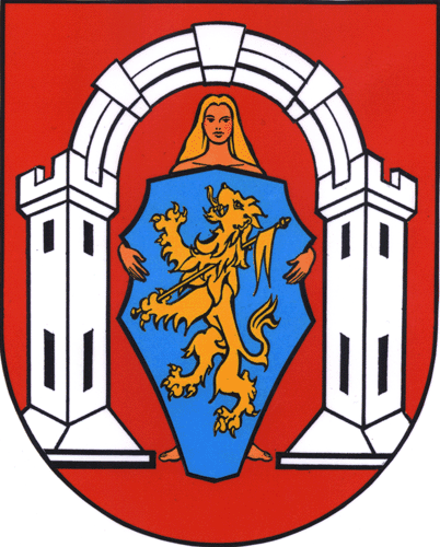 Stadtwappen von Vukovar Benutzung für die wikipedia gemäß GNU FDL durch Mail vom 04.08.04 freigegeben (Lidija Miletic, Stadtverwaltung Vukovar)